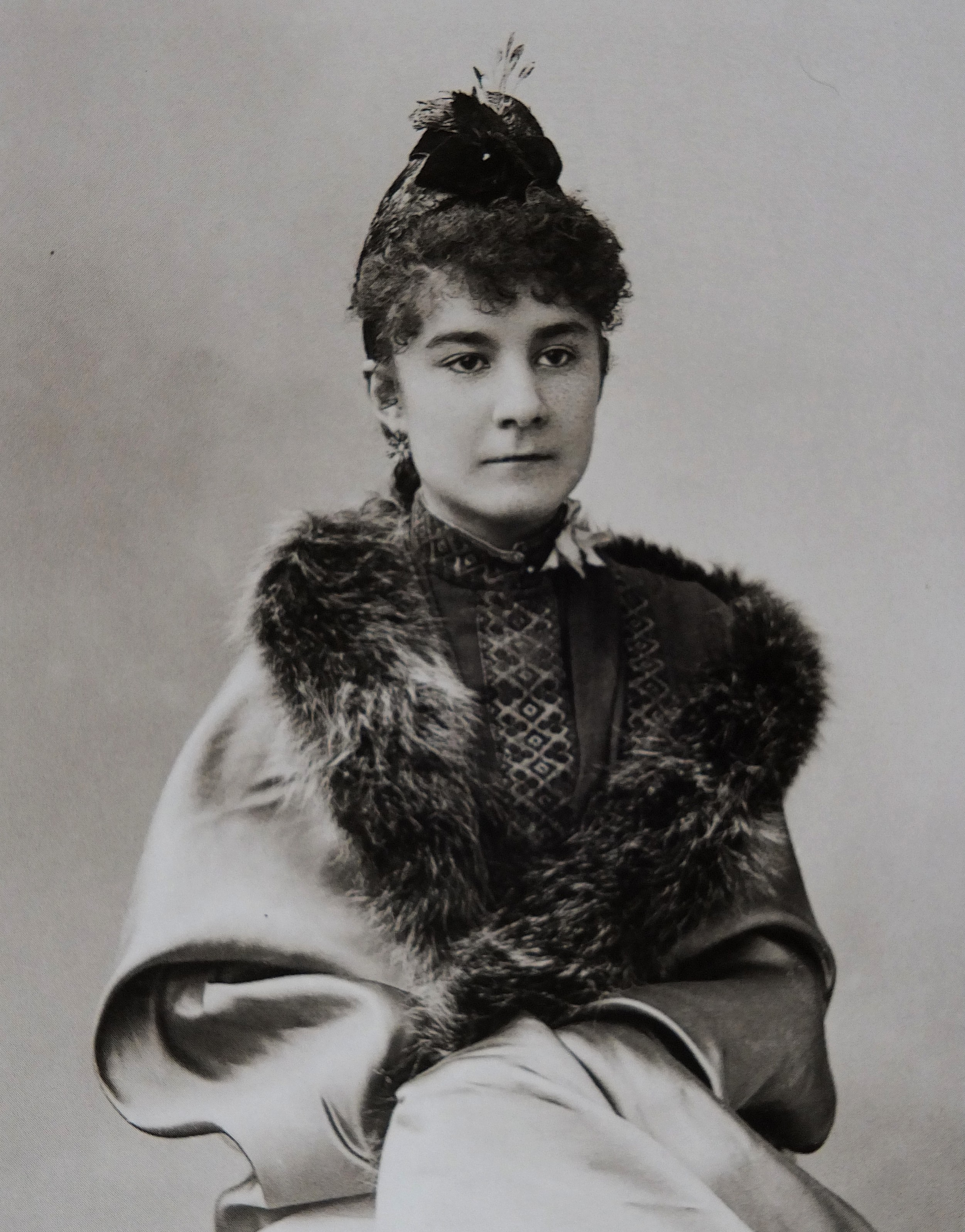 Marie de Heredia, photographiée par Paul Nadar le 18 avril 1889.